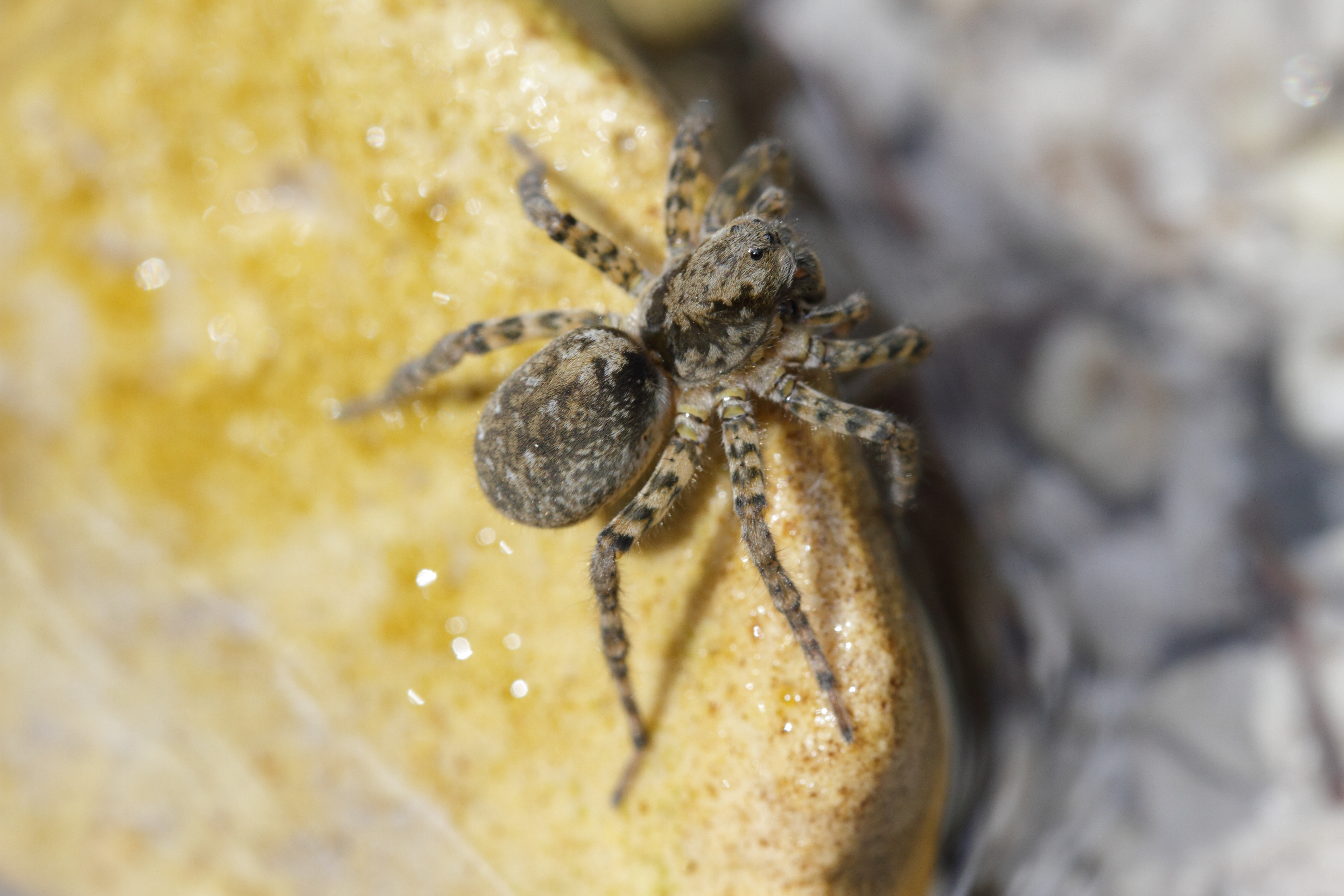 Eine Wolfspinne in der Steiermark.